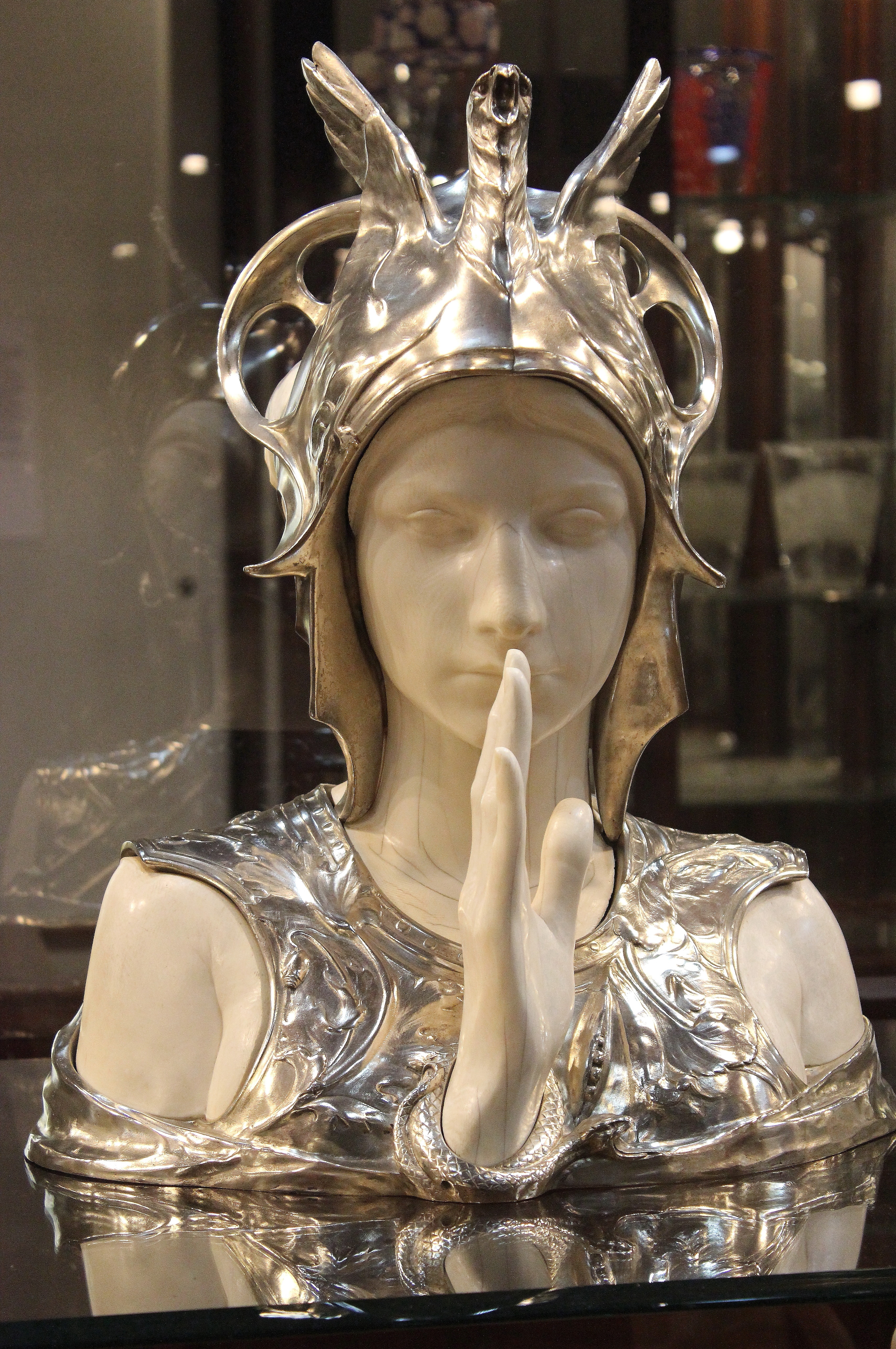 Le Sphynx mystérieux, Charles Van der Stappen (1897), Musées royaux d'art et d'histoire, Bruxelles